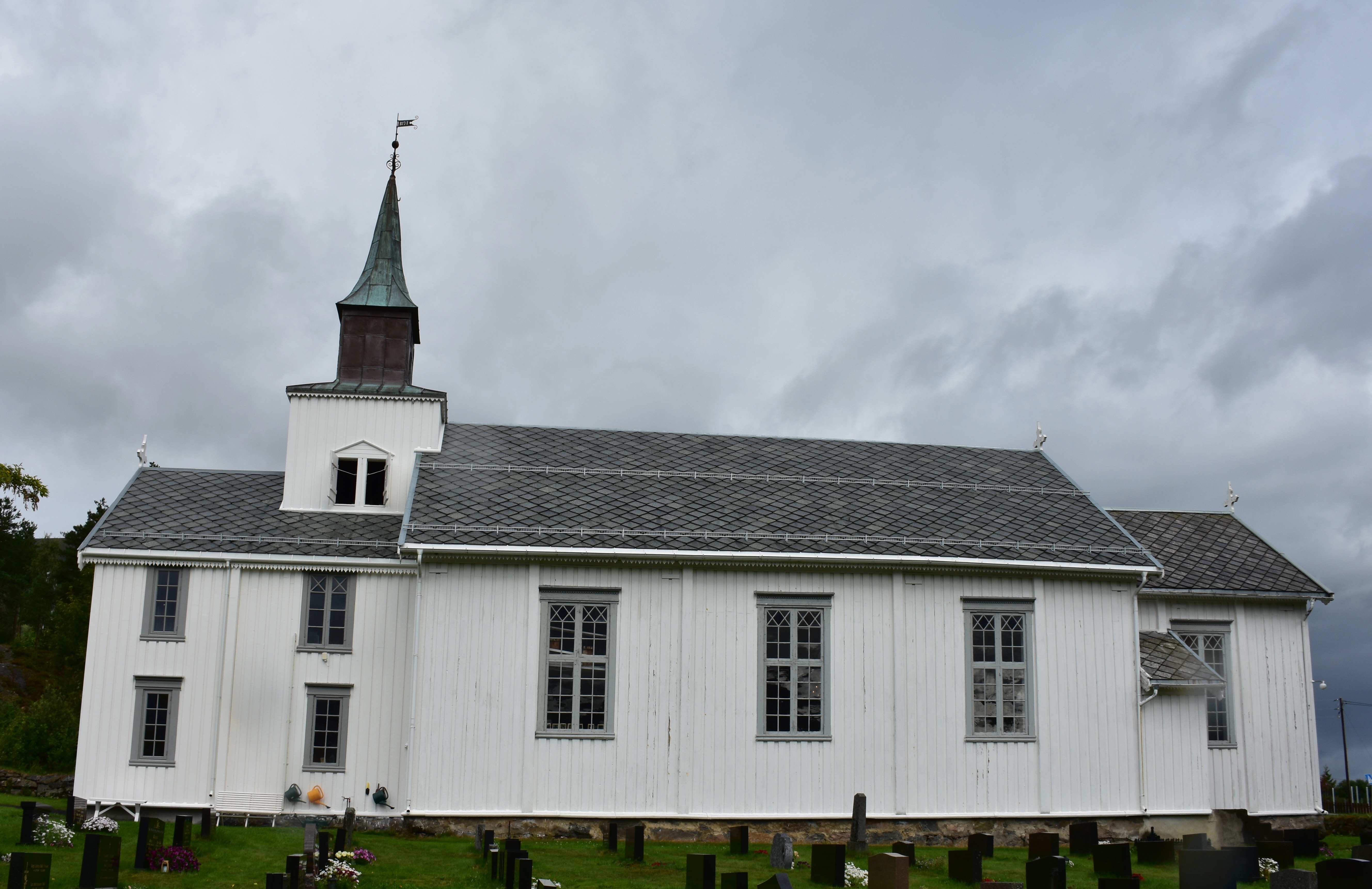 Eide kirke, Eide kommune, Møre og Romsdal